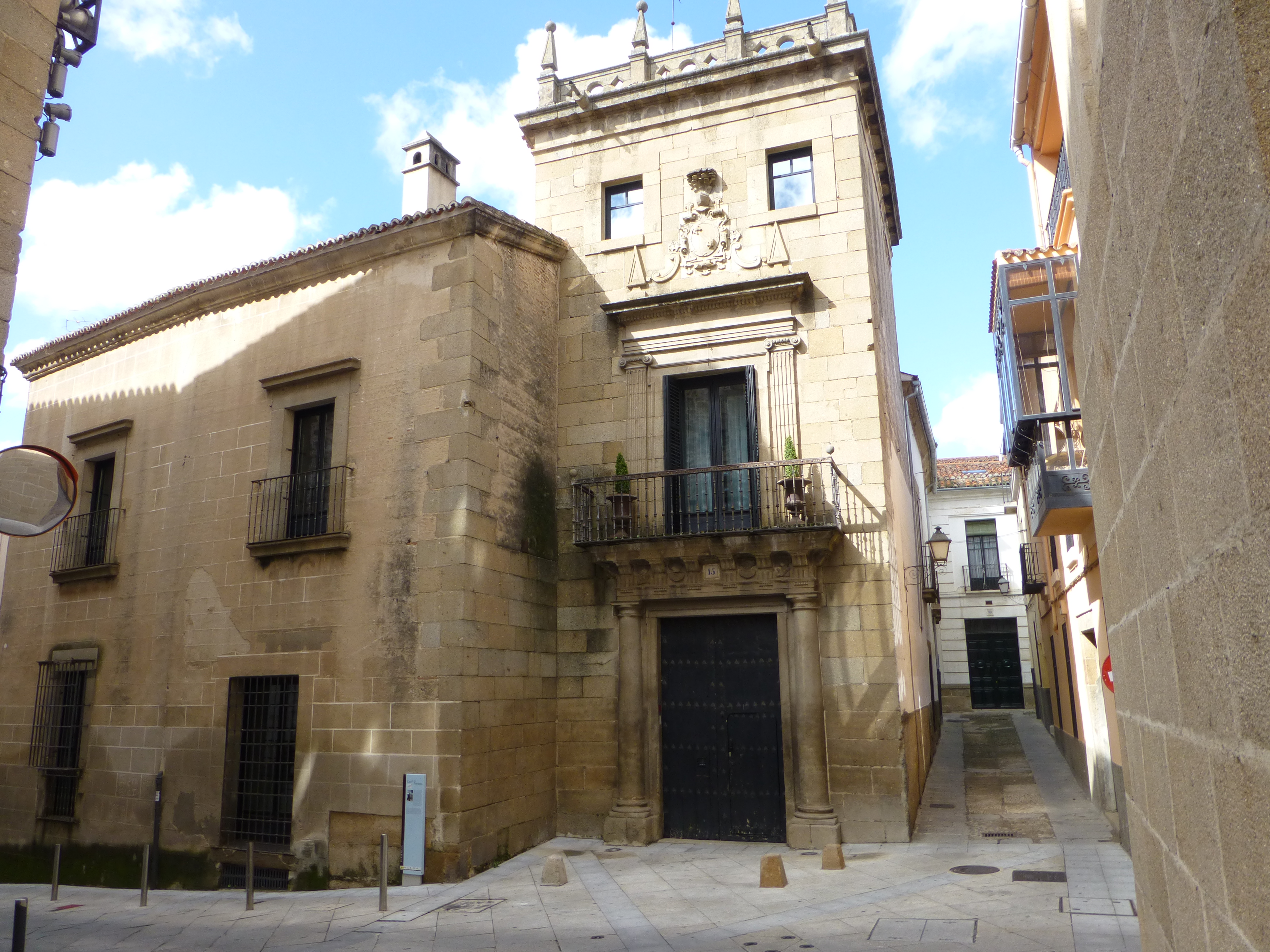 Casa de los Almaraz. Plasencia, Extremadura, España.